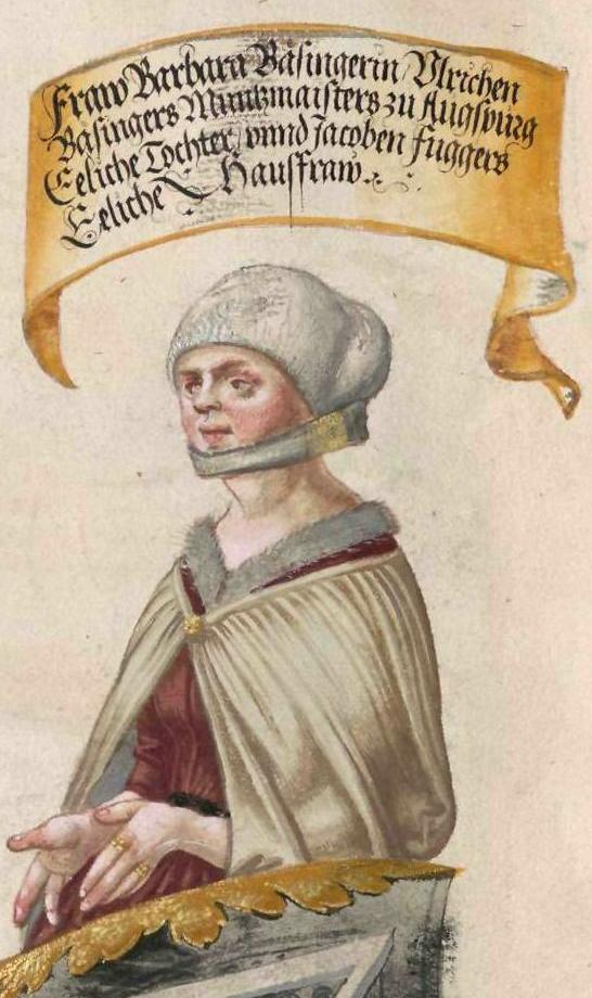 Geheimes Ehrenbuch der Fugger, hergestellt in der Werkstatt Jörg Breu d. J., 1545–1549 Portrait- und Wappendarstellung